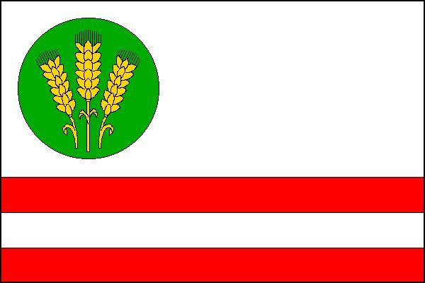 Vlajka obce Skaštice